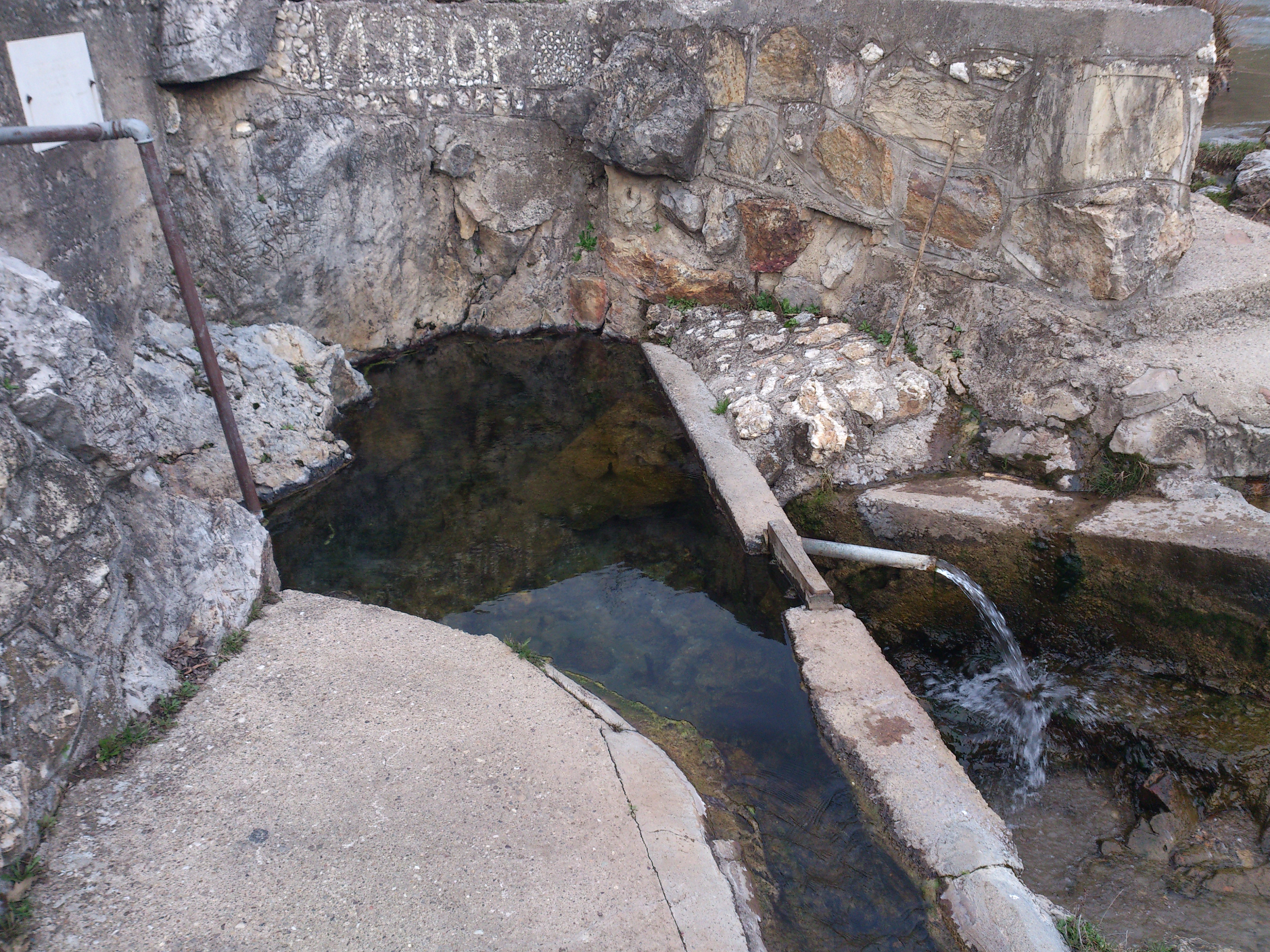 Извор познат по својим лековитим дејствима.